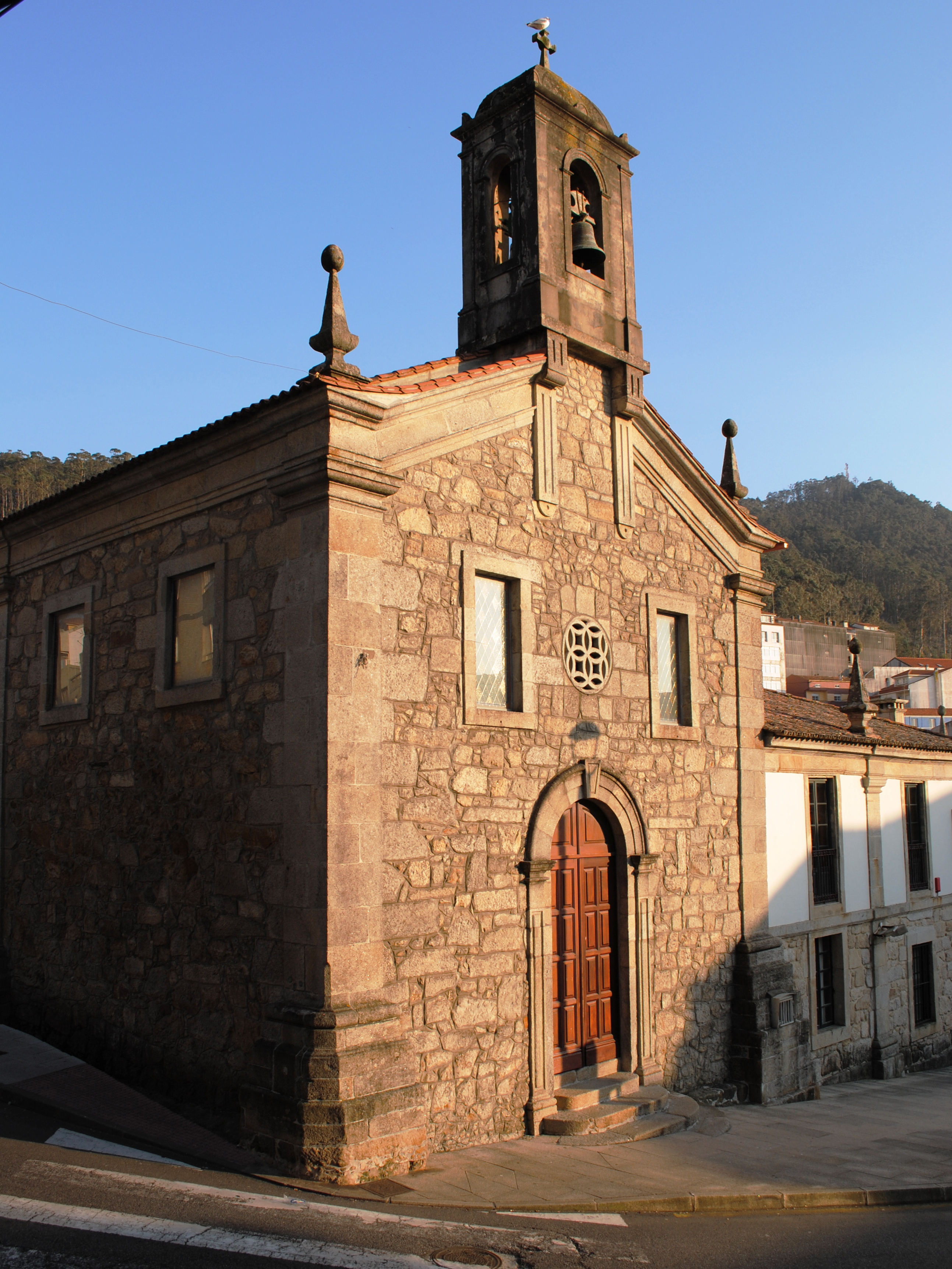 Convento de San Bieito, A Guarda